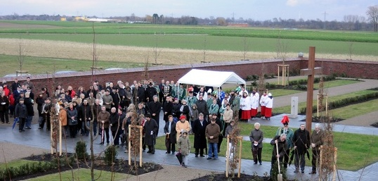 Einsegnung des Friedhofes in Borschemich-Neu am 05.12.2009